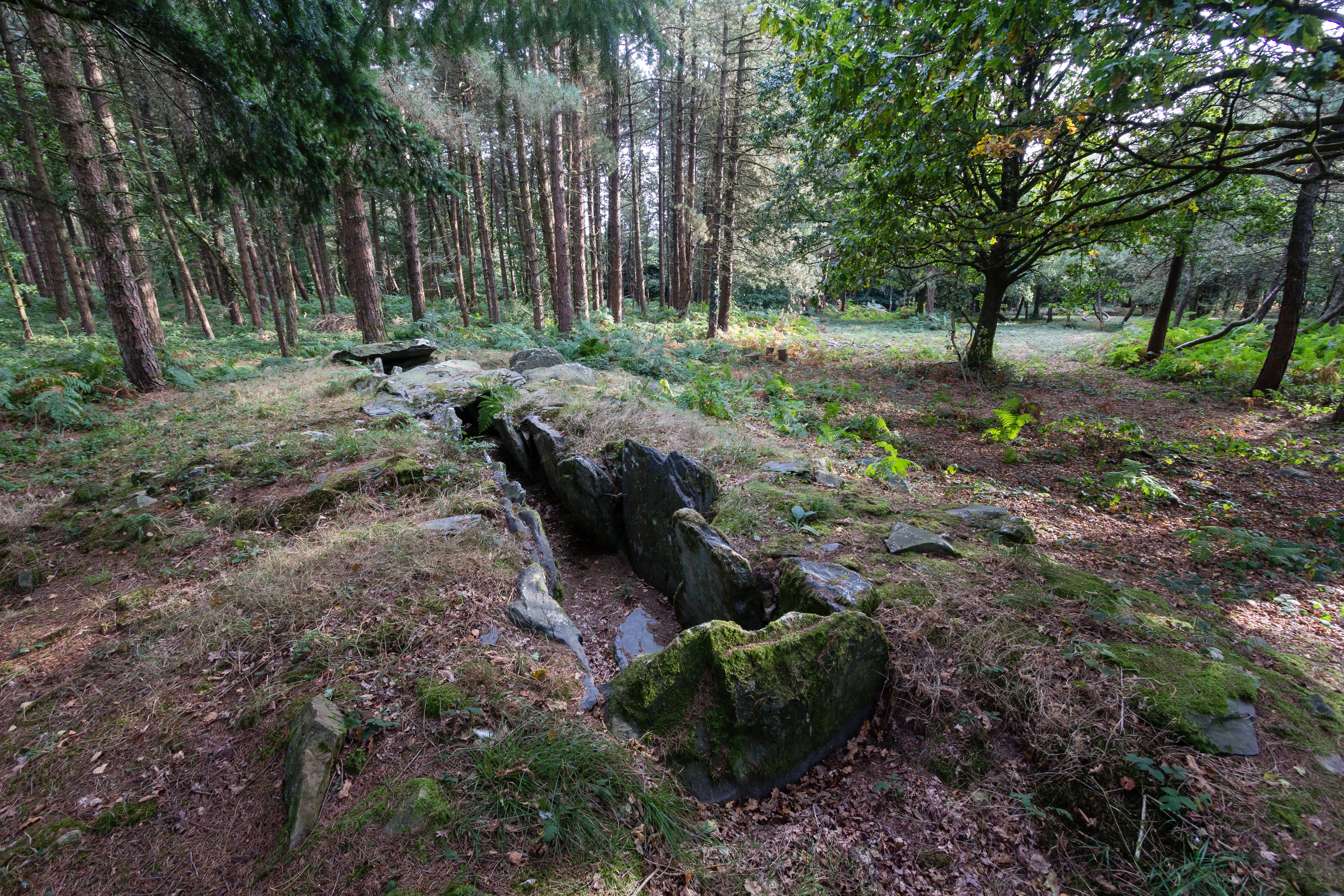 Dolmen de Corn-er-Houët (Caurel, France).